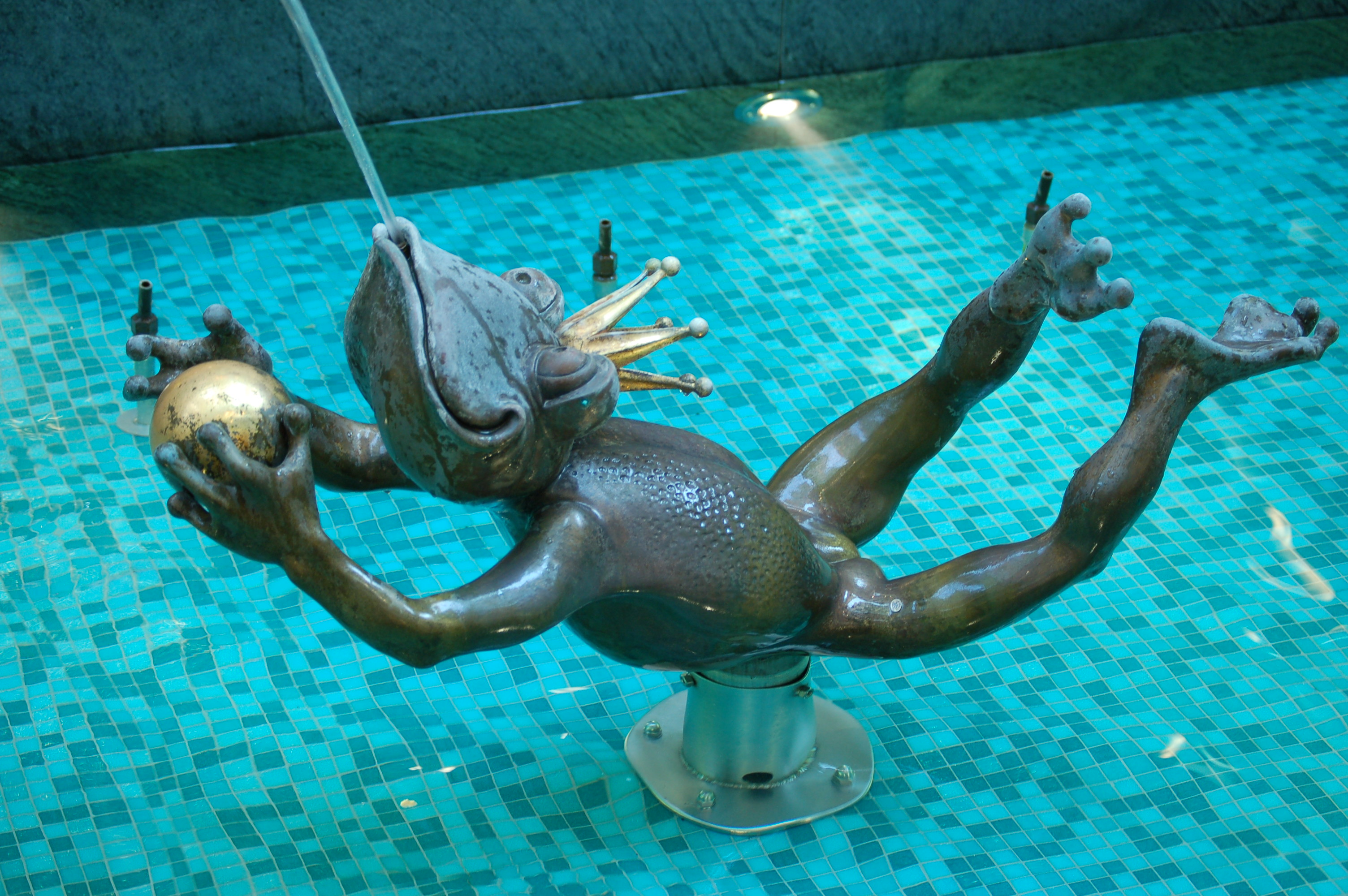 Froschkönig, Märchen, Brunnen,Wasser, im sprung Frog king, fairy tale, well, water, in the jump